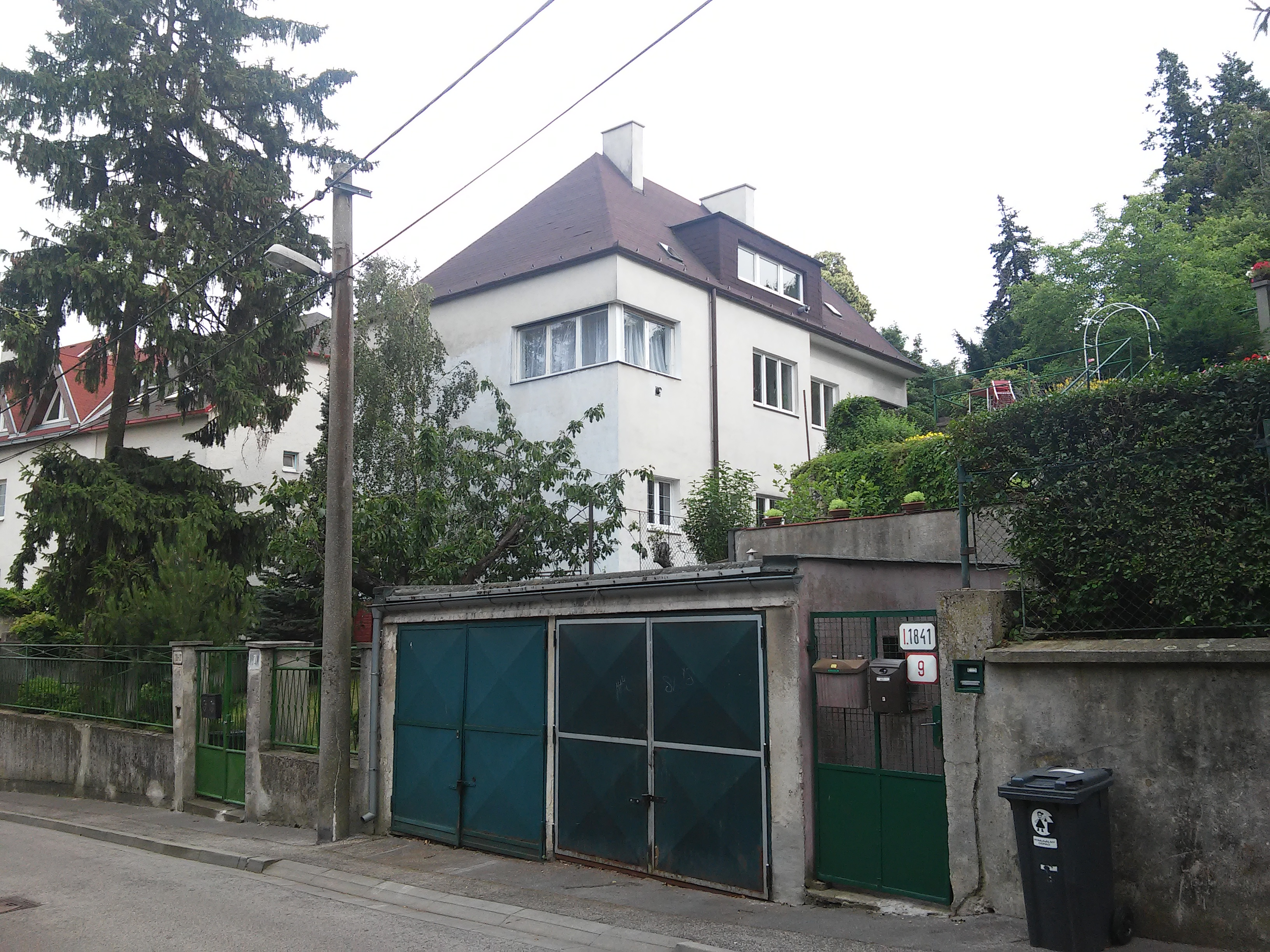 Rodinný dom na svahu, Bartoňova 7, Staré Mesto, Bratislava